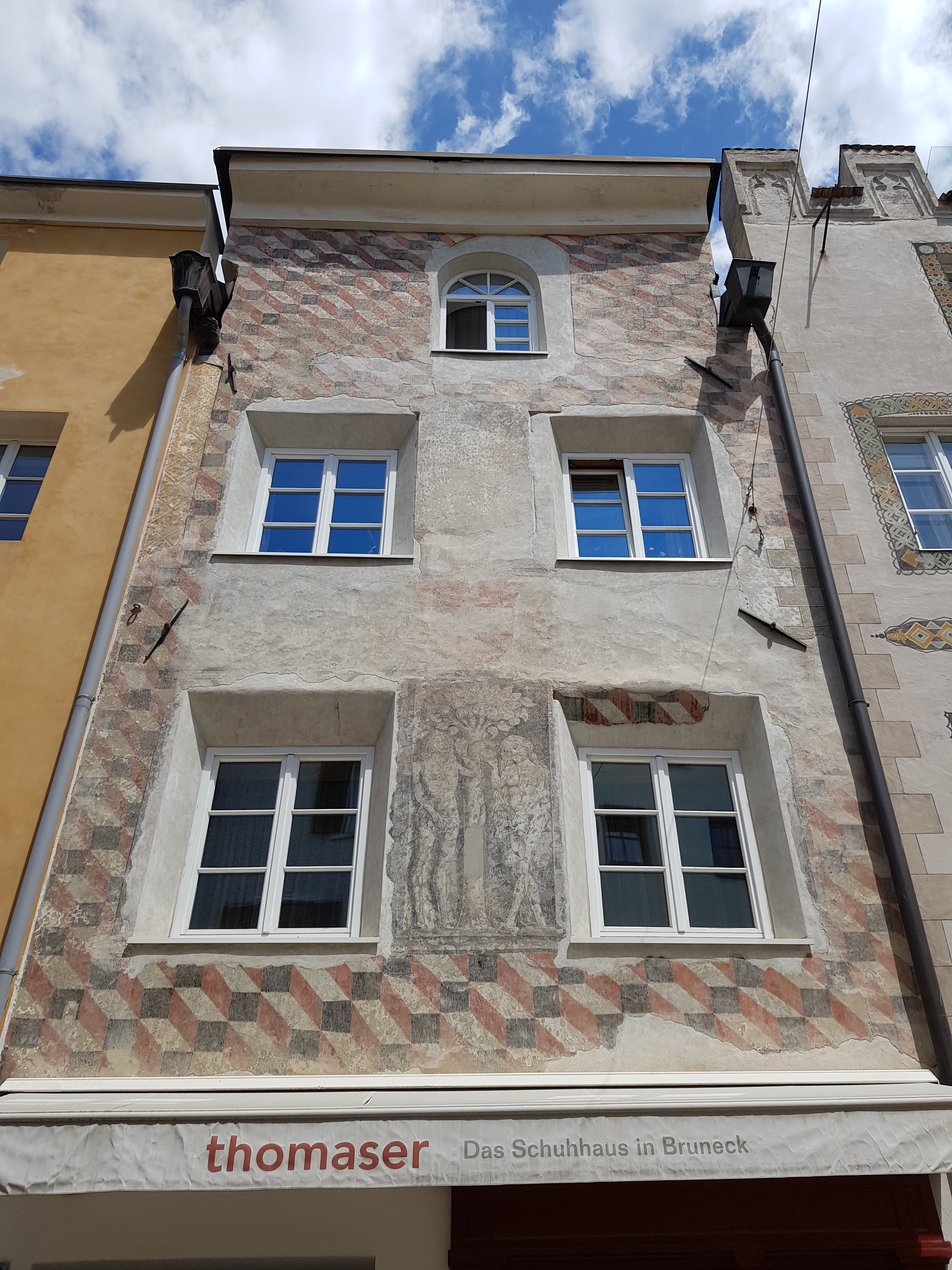 Haus Stadtgasse 23, Bruneck, Südtirol